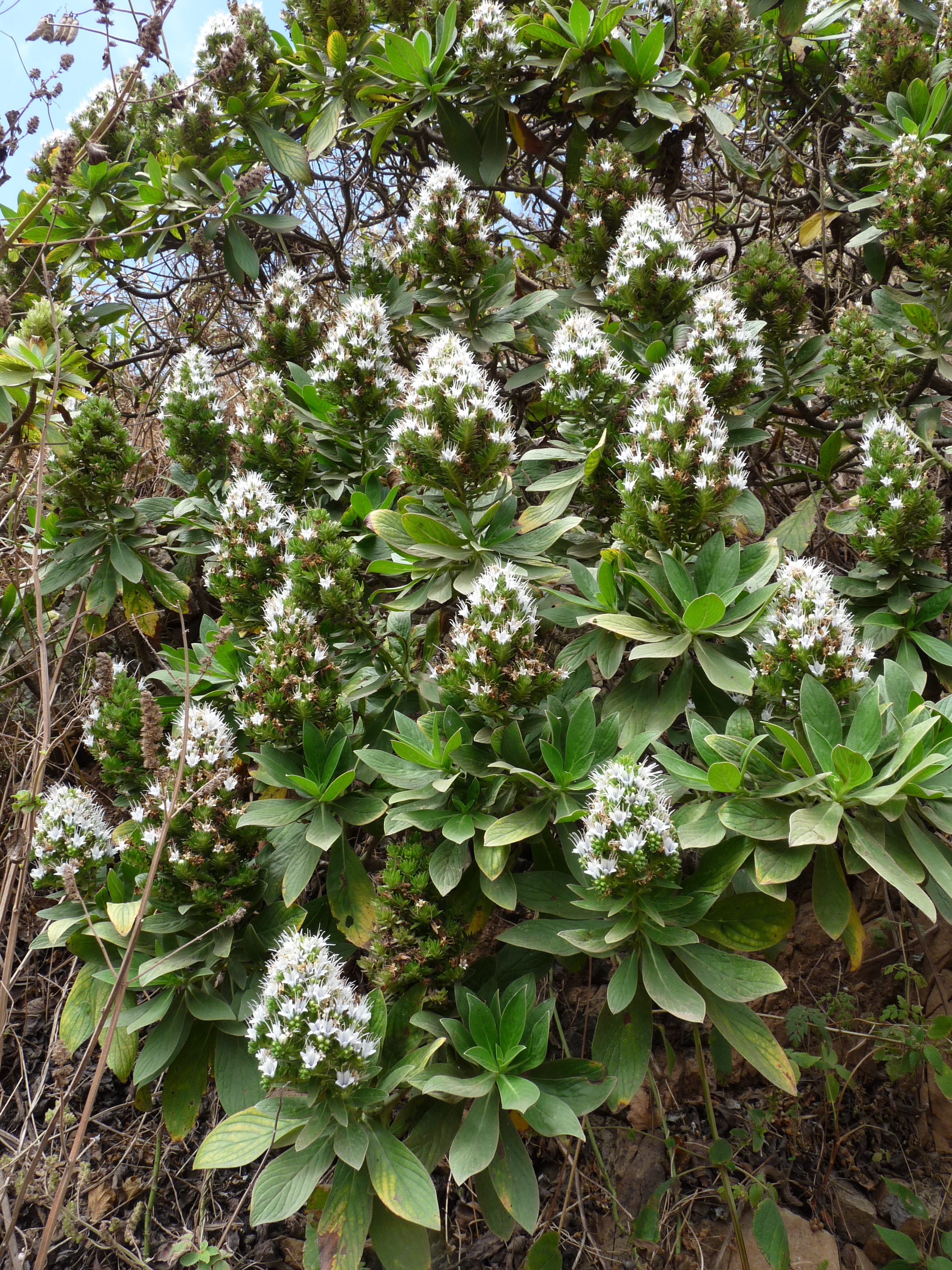 Ribeira Principal (île de Santiago, Cap-Vert) : Echium hypertropicum, espèce endémique